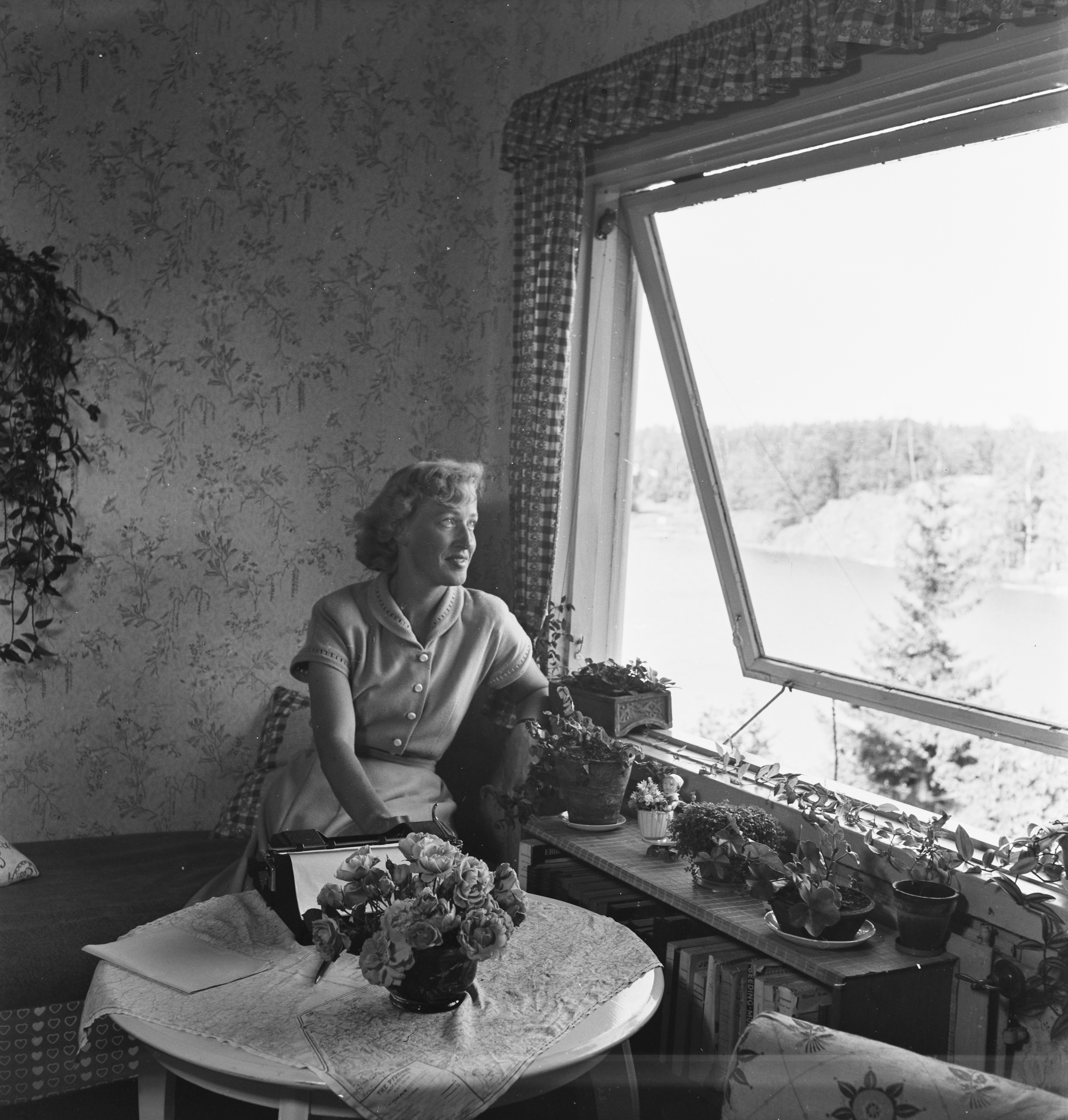 kirjailija Rita von Willebrand huvilallaan; mustavalkoinen